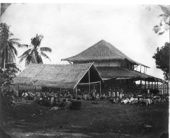 Foto. Markt in Bantam